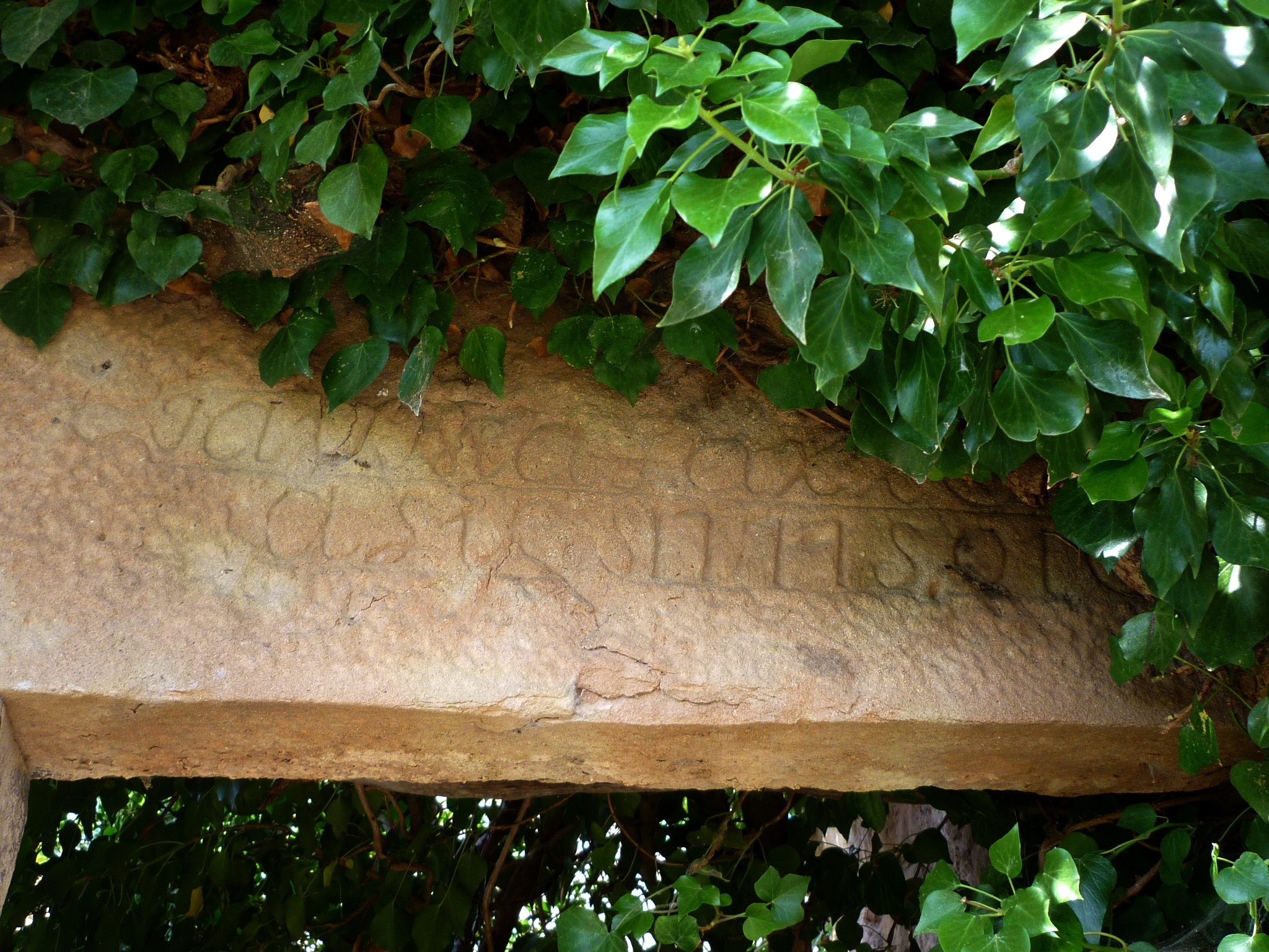 Cal Solé de Pampa (Castellar de la Ribera): inscripcions a una llinda